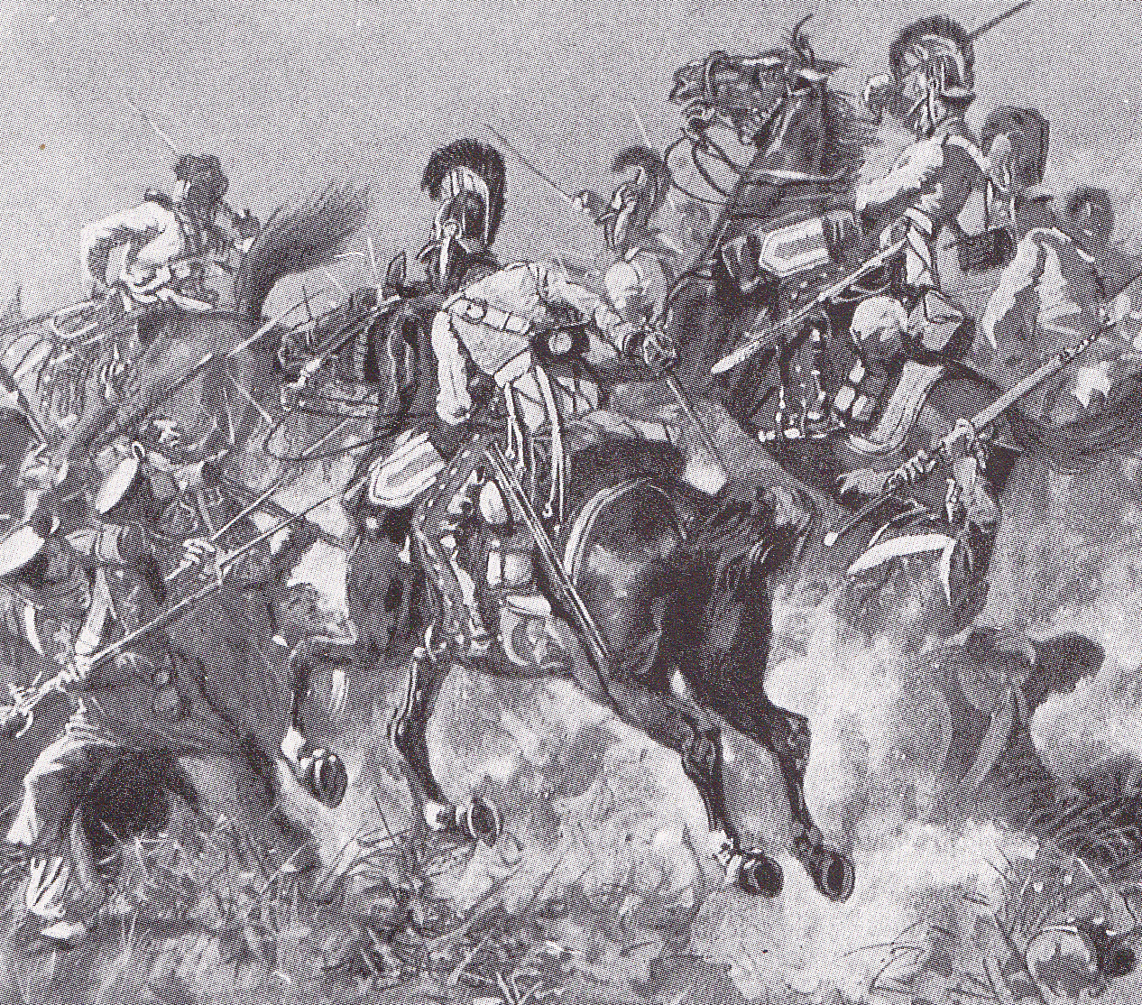 Charge du « Ostpreuss-regiment » au combat d'Haynau, le 26 mai 1813. Cette unité fait partie du corps du maréchal Blücher, attachée à la cavalerie de réserve commandée par le colonel von Dolffs. Ce dernier charge par surprise la division française du général Maison à Haynau, le 26 mai 1813, avec 3 000 de ses cavaliers. Les Prussiens mettent hors de combat 500 hommes, prennent 400 prisonniers et capturent 11 canons, tout en perdant le colonel von Dolffs et 240 cavaliers tués ou blessés.